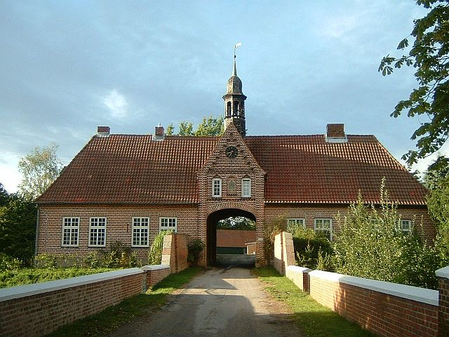 ein Gutshaus des ansässigen Landadels, gehört zur Gemeinde Schashagen in Ostholstein, Germany. Eingangsgebäude zu den dahinter liegenden Stallungen, Wohn - und Wirtschaftsgebäuden.